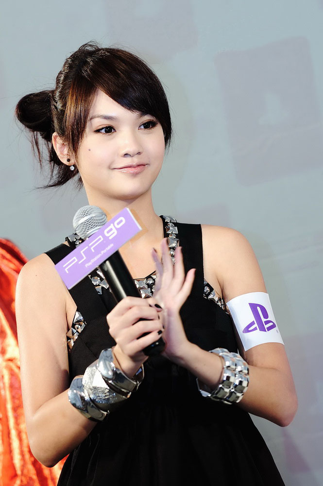 楊丞琳 台北．信義區